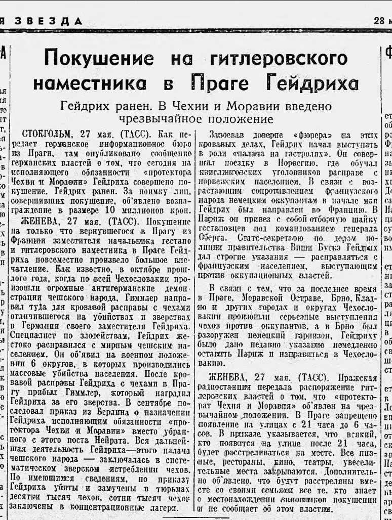 Správa o atentáte na Heydricha v novinách Krasnaja zvezda zo dňa 28.51942